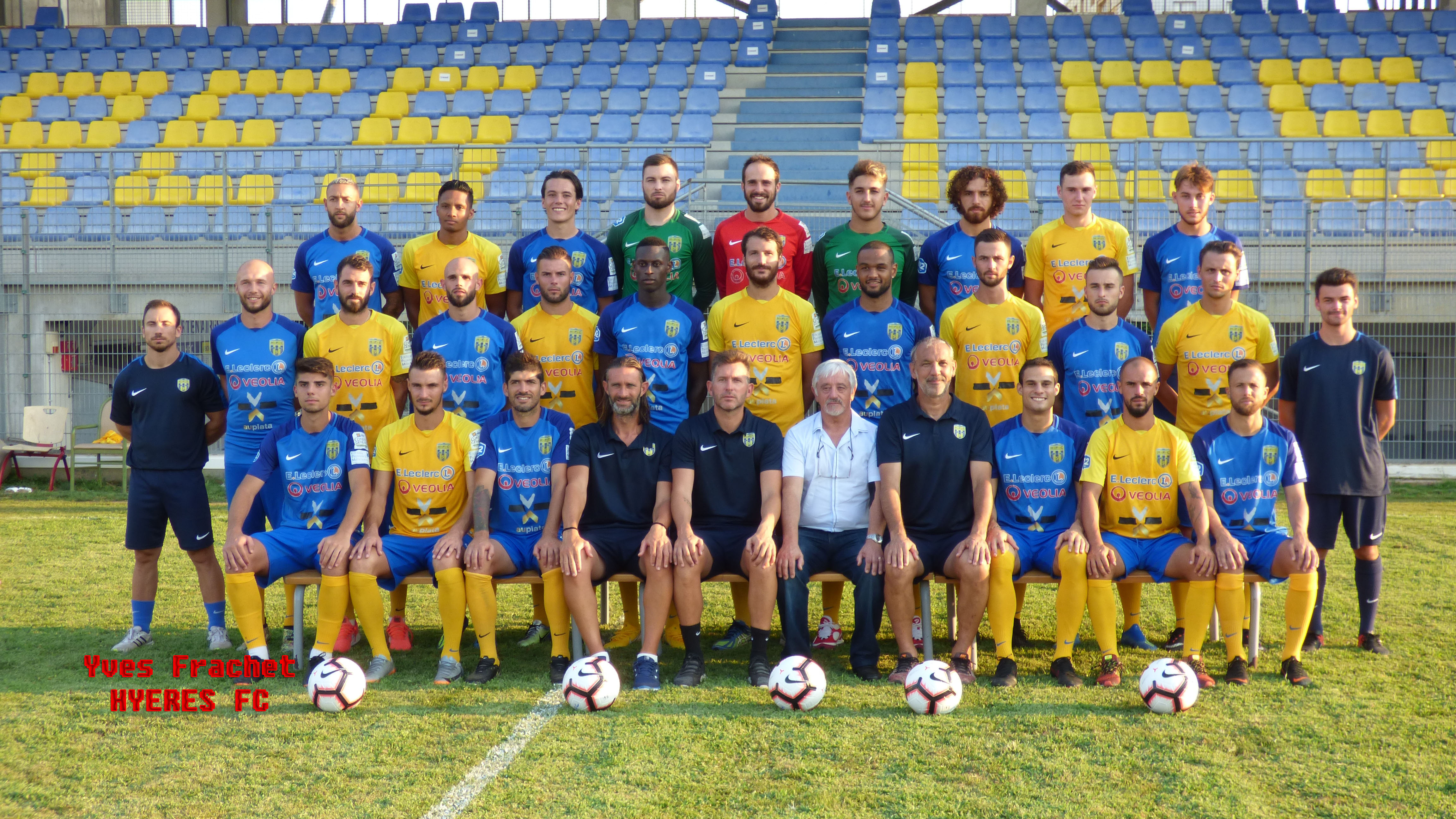 EQUIPE DE FOOTBALL HYERES FC SAISON 2018-2019 NATIONAL 2 GROUPE A ENTRAINEUR LILIAN COMPAN